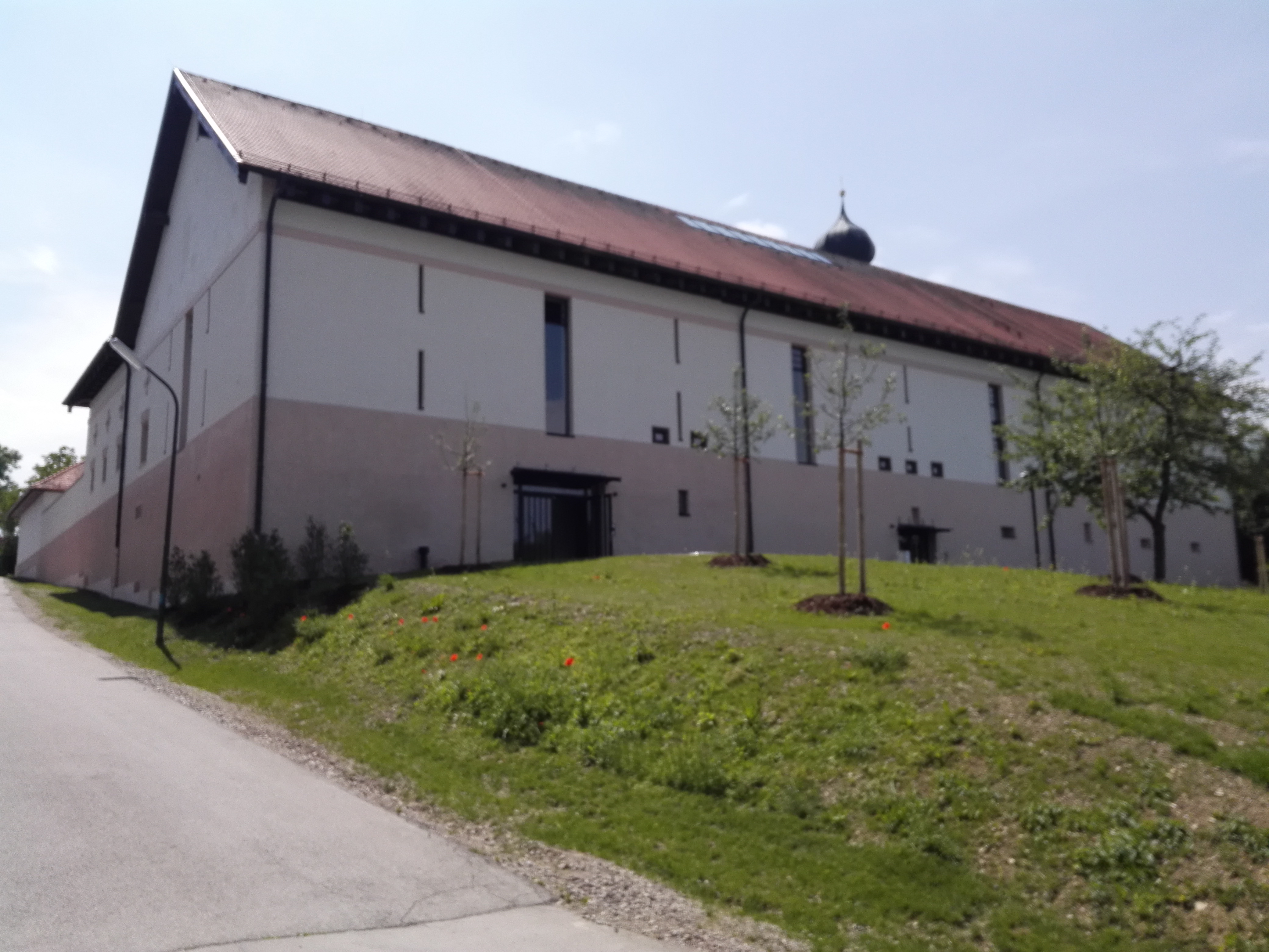 Nordseite des ehemaligen Pfarrstalls beim Pfarrhaus St. Georg in Aufkirchen (Egenhofen)